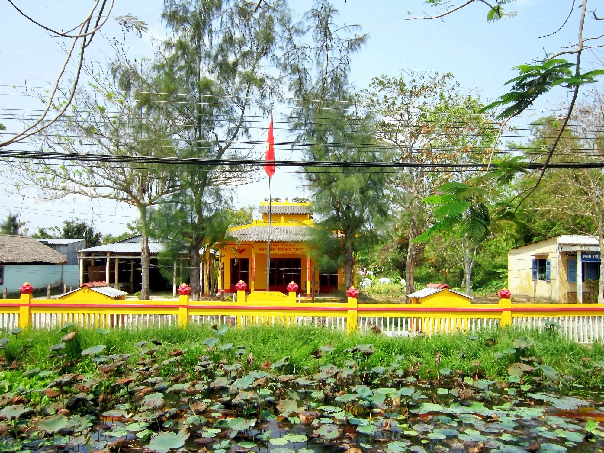 Đình thần Nguyễn Trung Trực bên Quốc lộ 61B ở thị trấn Long Mỹ, thuộc huyện Long Mỹ, tỉnh Hậu Giang, Việt Nam.